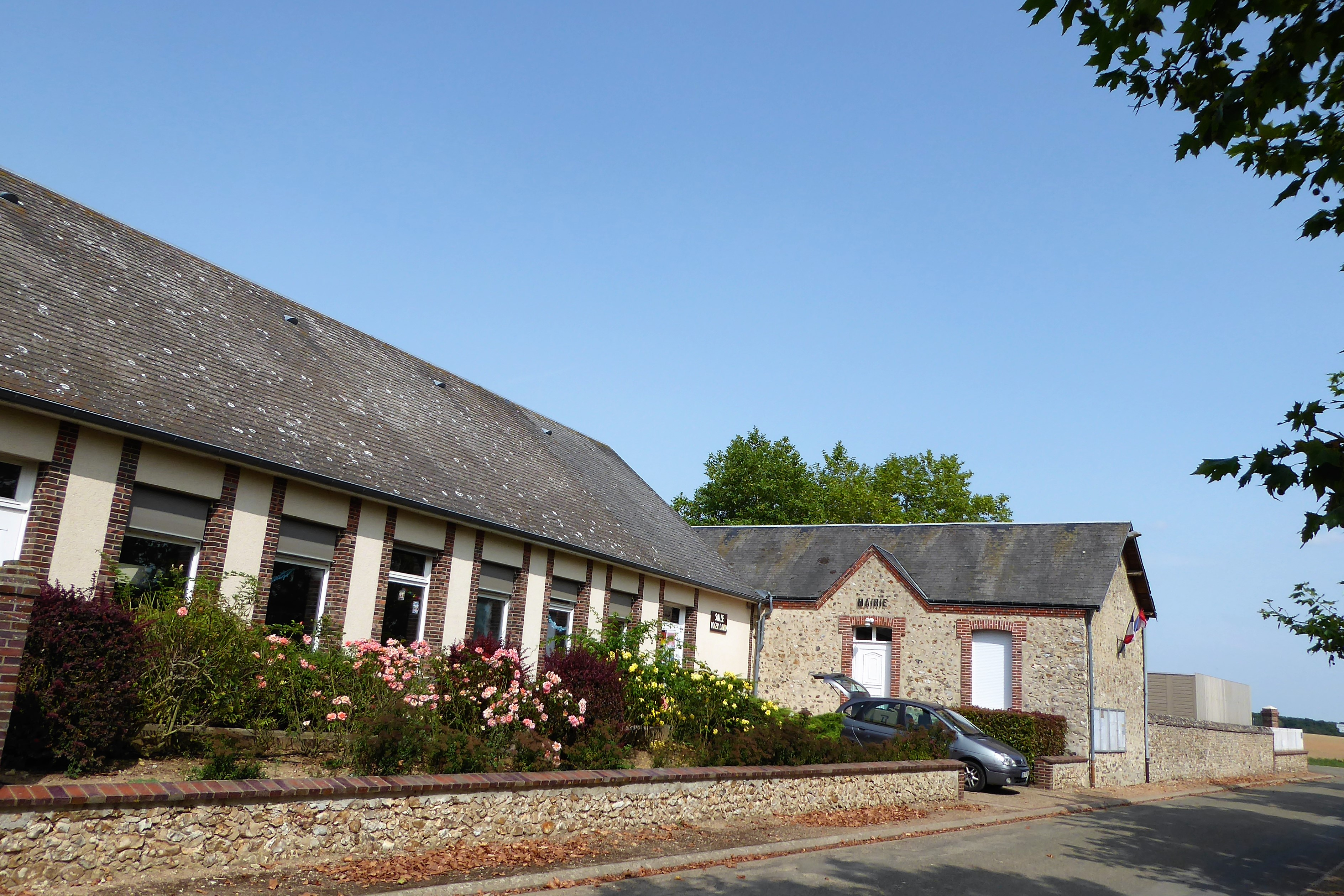 Mairie de Billancelles, Eure-et-Loir (France).